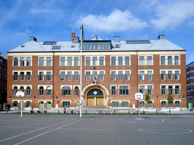 Göteborgs högre samskola i Göteborg (före detta Östra real)